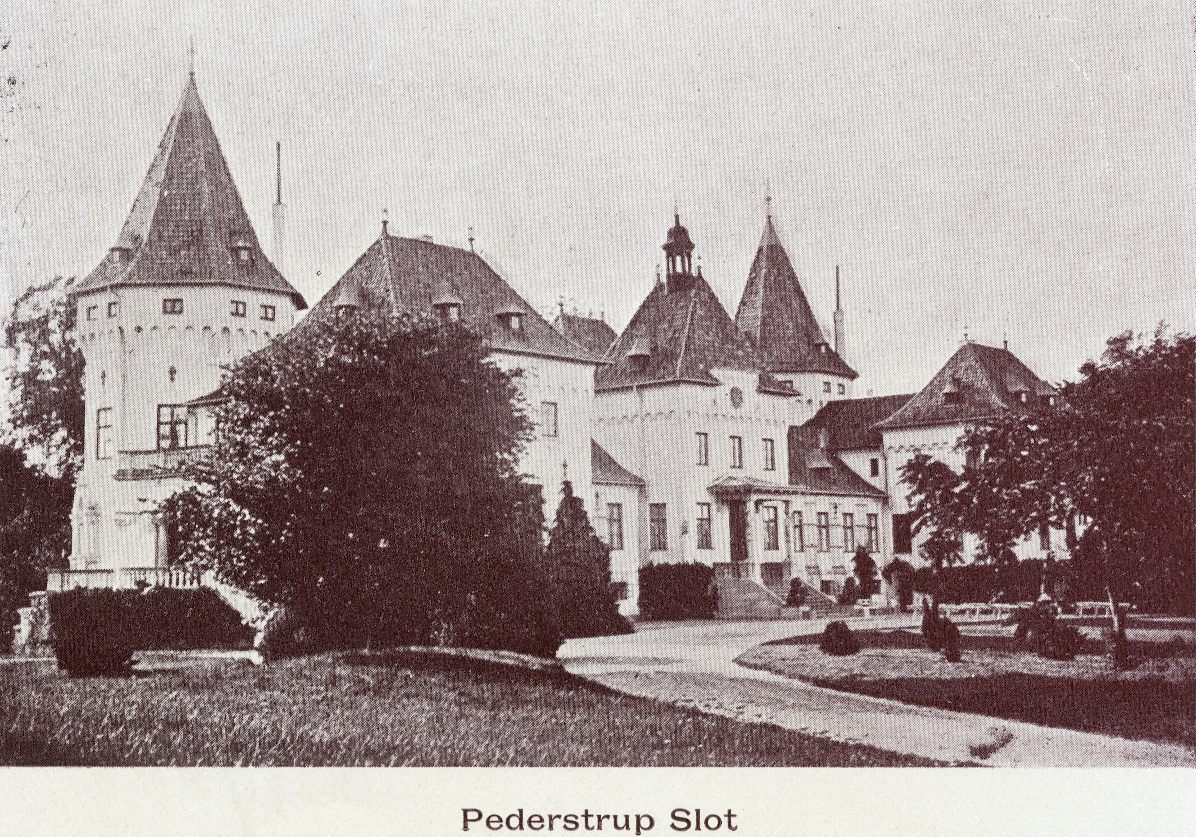 Pederstrup Slot i Vesterborg sogn på Lolland